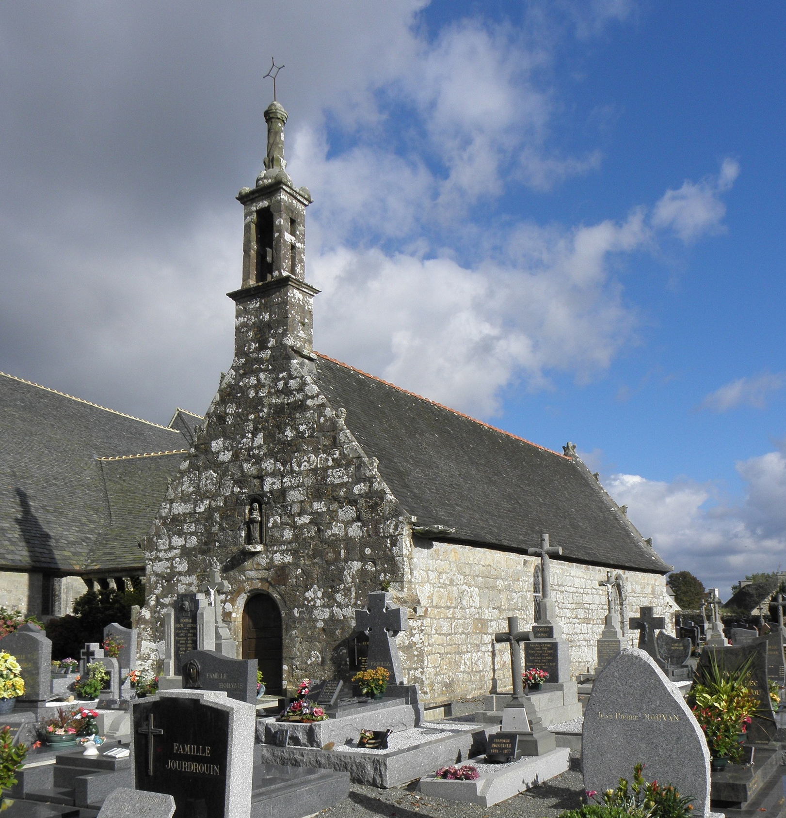 Flanc sud et façade occidentale de la chapelle Sainte-Nonne de Dirinon (29).